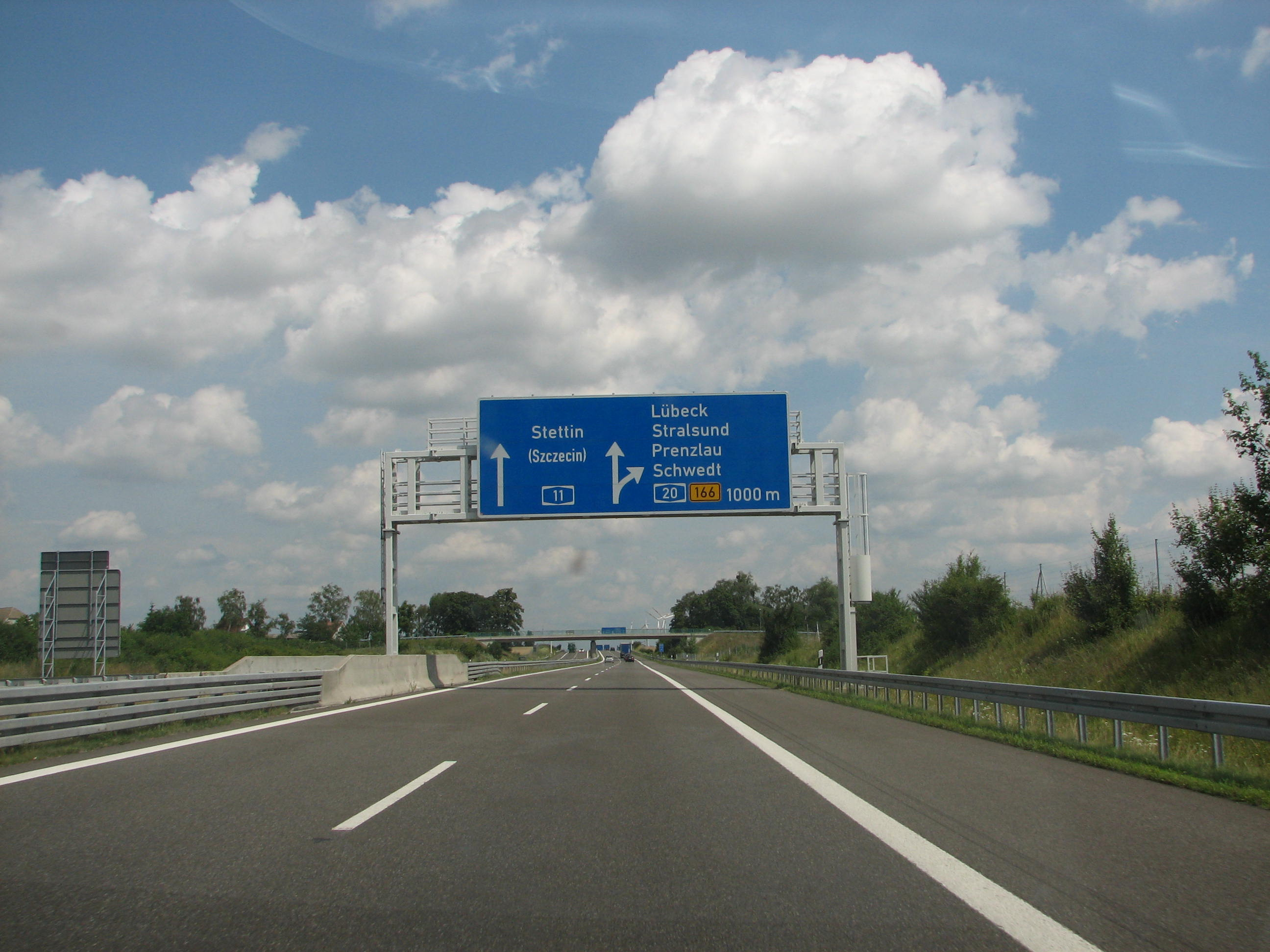 Hinweisschild am Autobahndreieck Kreuz Uckermark